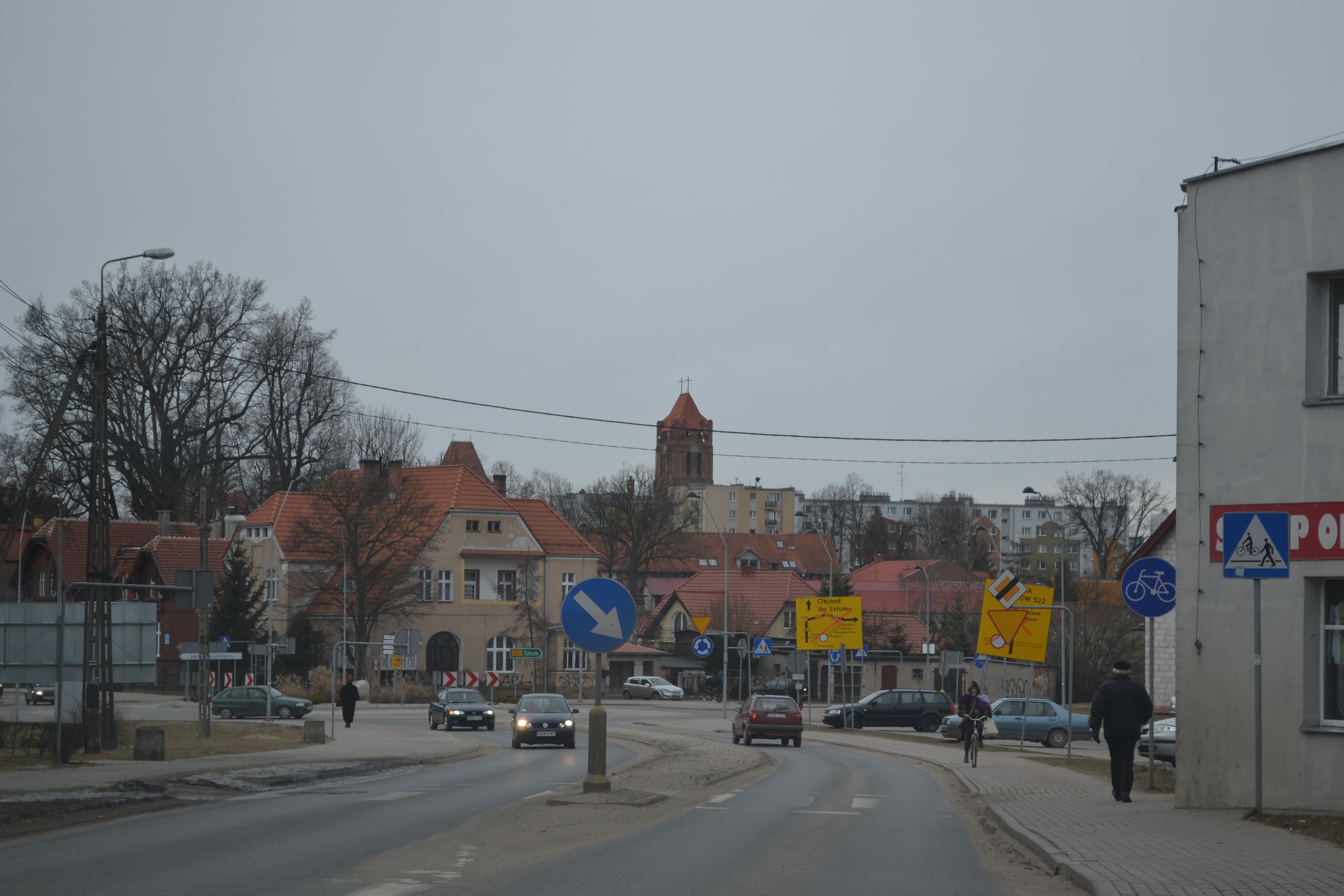 Panorama miasta. Widok ul.Władysława Jagiełły